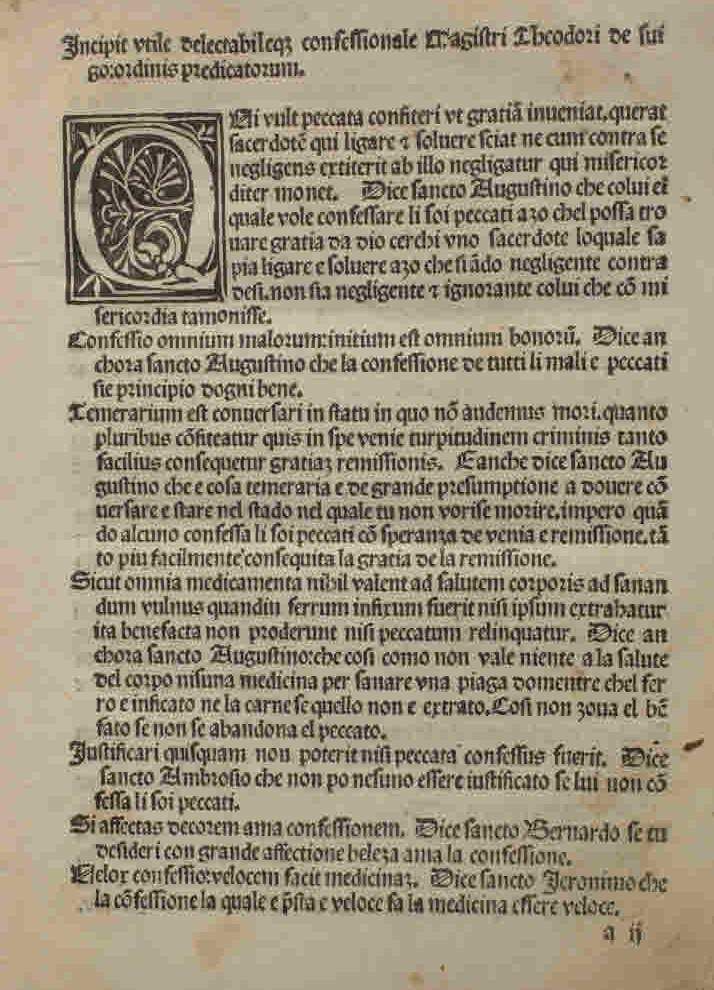 Confessionale. - Impresso in Milano : dall'optimo artifice magistro Ulderico Scincenzeler facto a spesse de d. Alexandro Rotio, nel MCCCCLXXXXVI adi X de martio. - 86 c. ; a-k⁸, l⁶ ; 4°. - Marca tipografica nell'explicit .